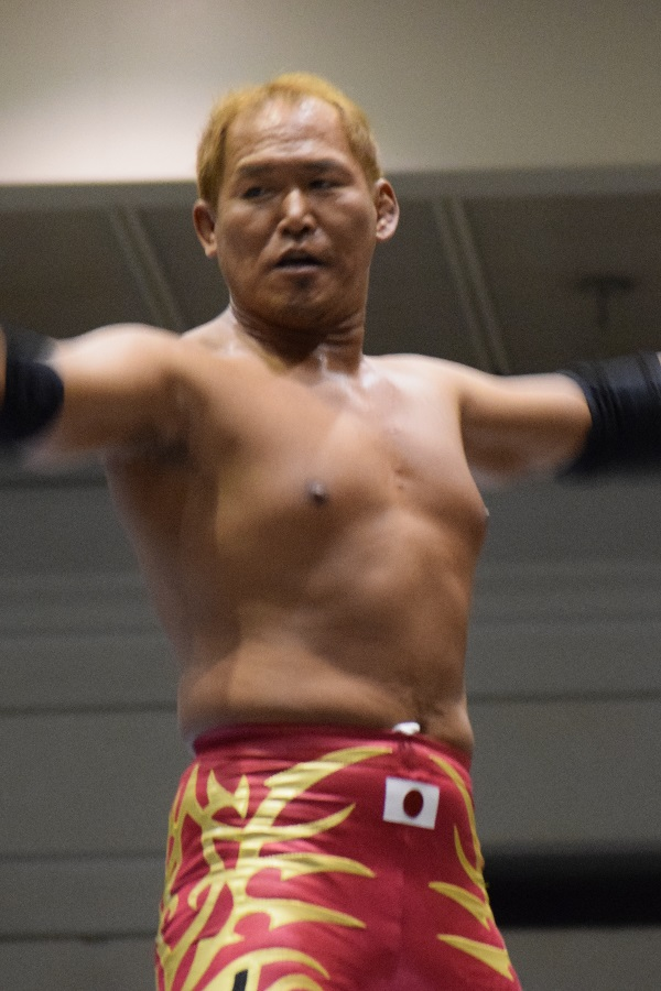 2017年1月13日 大阪府立体育会館・第二競技場「CMLL FANTASTICA MANIA 2017」 OKUMURA